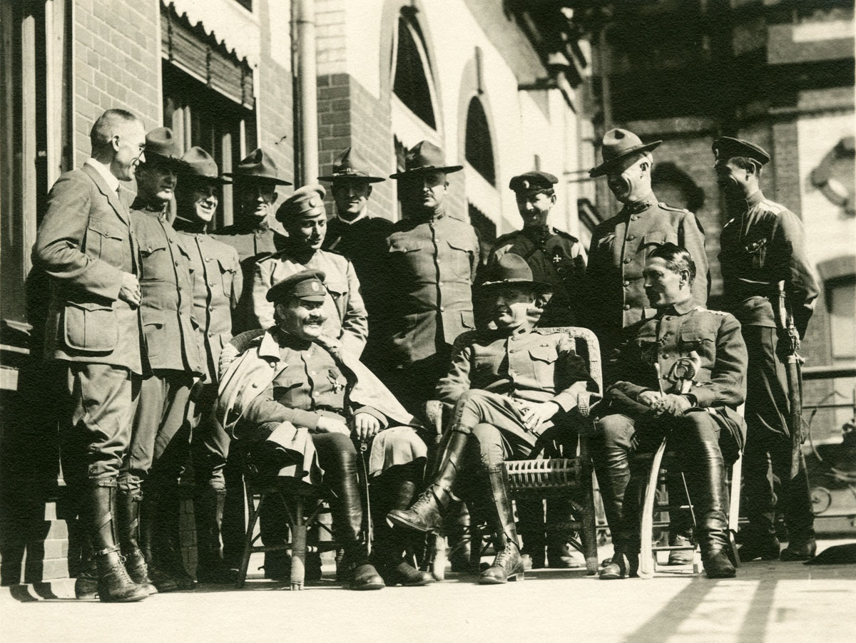 Атаман Г. М. Семёнов с представителями американской миссии. Владивосток. Сидят: атаман Семёнов (слева) и генерал Грейвс (справа)